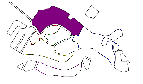 Sestiere di Cannaregio a Venezia